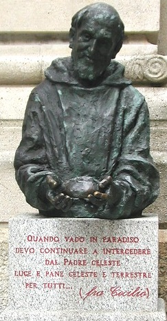 Monumento a San Francesco d'Assisi a Milano. Lo scultore Domenico Trentacoste decise di modellare il volto del santo sul modello di quello di fra Cecilio Maria Cortinovis del convento di Milano, oggi proclamato Servo di Dio.